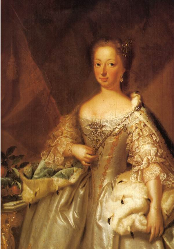 Portret van prinses Anna van Hannover, vervaardigd in de achttiende eeuw. Schilder: J. Tischbein (1715-1768). De auteursrechten zijn begrijpelijkerwijs allang vervallen. Afbeelding komt in meerdere publicaties voor. Deze versie gevonden op alwaar het zonder auteursrechten gekopieerd mag worden.